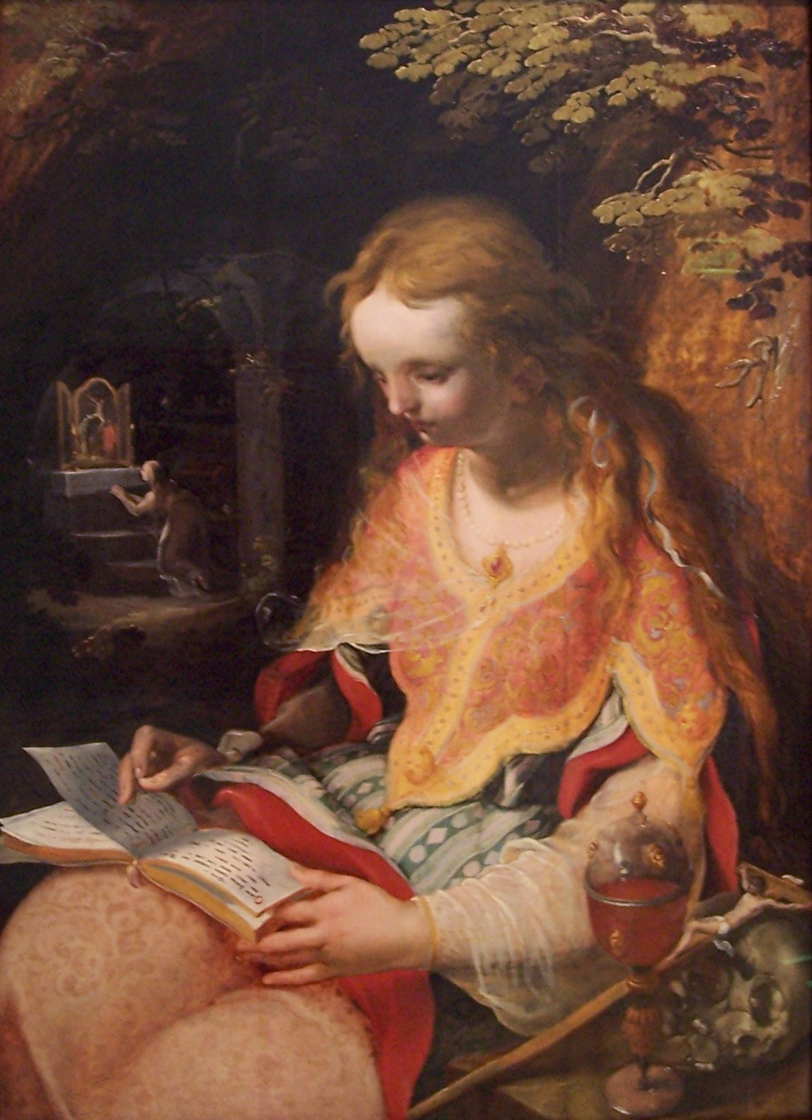 Maria Magdalena